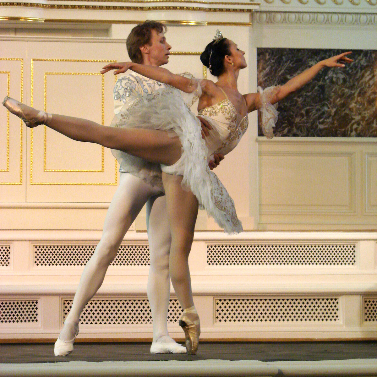 Ballet classique au théâtre de la Chapelle (Capella) à Saint-Pétersbourg (Russie) Carnet de voyage 2006 La Capella est la plus ancienne institution de musique professionnelle de la Russie. Créée en 1479 par le tsar Ivan III, elle fut amenée à Saint-Pétersbourg par Pierre le Grand.